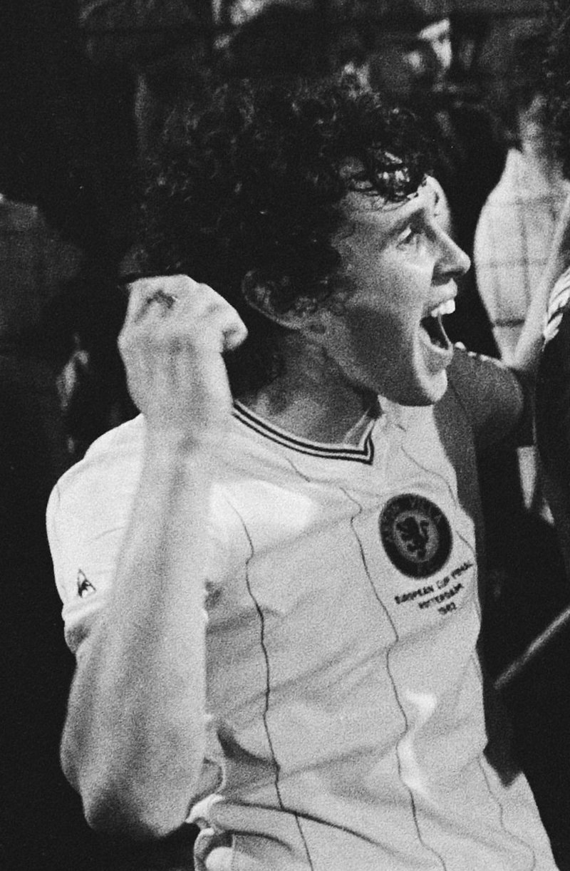 Collectie / Archief : Fotocollectie Anefo Reportage / Serie : [ onbekend ] Beschrijving : FC Bayern Munchen tegen Aston Villa 0-1 Europa Cup I blijde Aston Villa spelers met de Cup Datum : 26 mei 1982 Trefwoorden : sport, voetbal Persoonsnaam : Aston Villa, CUP, FC Bayern Munchen Fotograaf : Antonisse, Marcel / Anefo Auteursrechthebbende : Nationaal Archief Materiaalsoort : Negatief (zwart/wit) Nummer archiefinventaris : bekijk toegang 2.24.01.05 Bestanddeelnummer : 932-1812